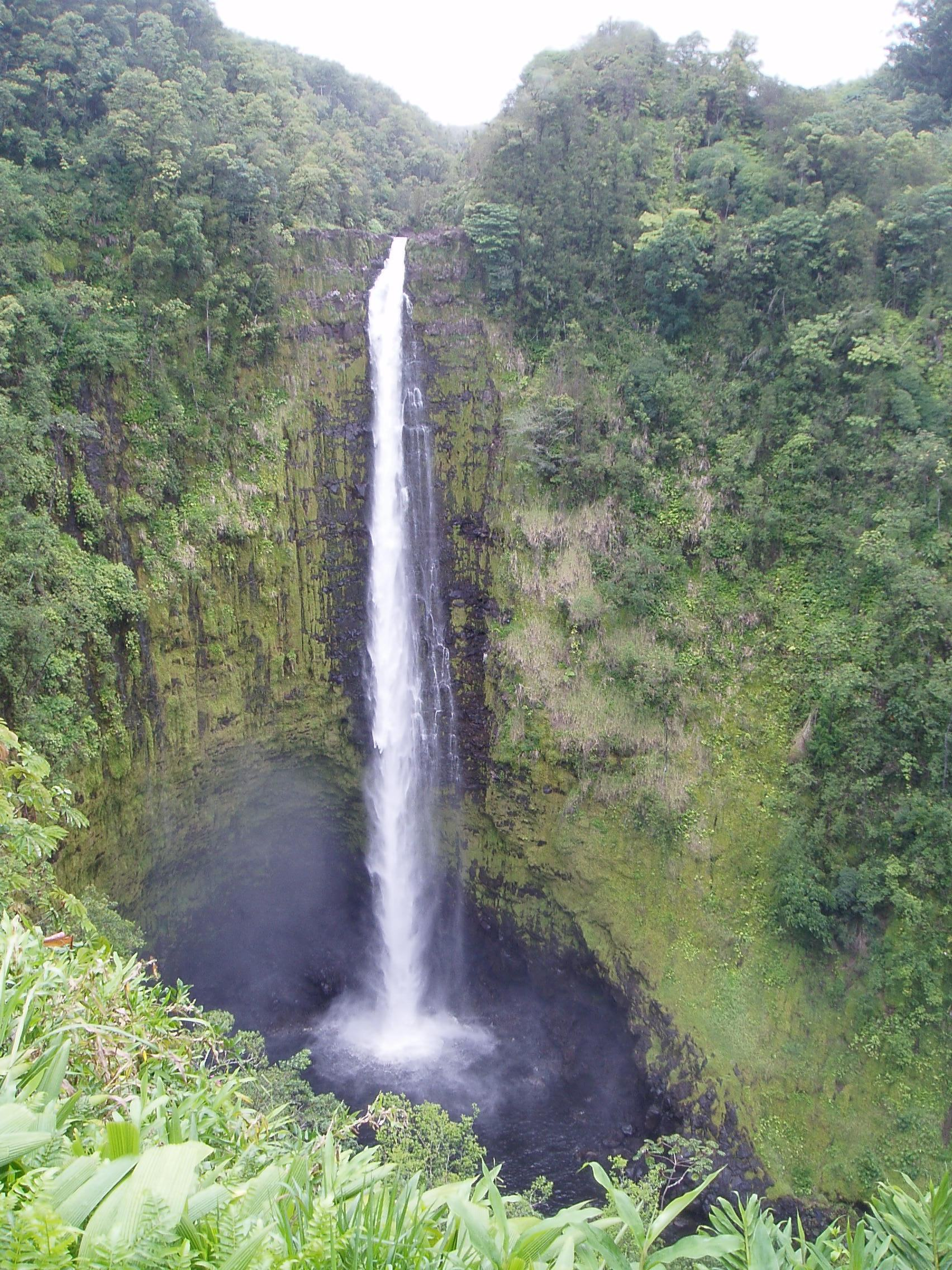 Akaka Falls, Hawaii. Limburgs: De raegebaogwaterval (Ka Uao Waiānuenue, Rainbow Falls) in'nebuurt van Hilo op Hawaï.